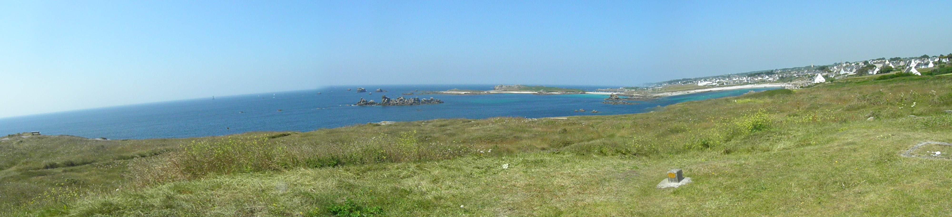 Panorama du bord de mer à Porspoder (Finistère, France).